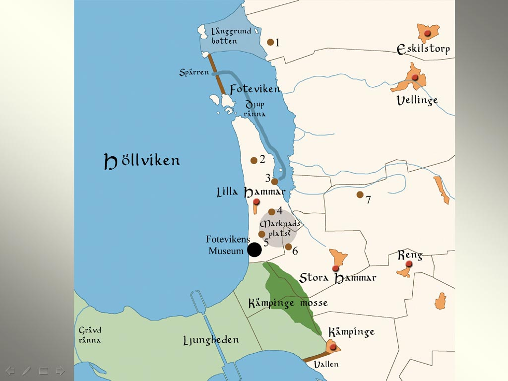 Map of Halor viking market in Skania, Sweden.